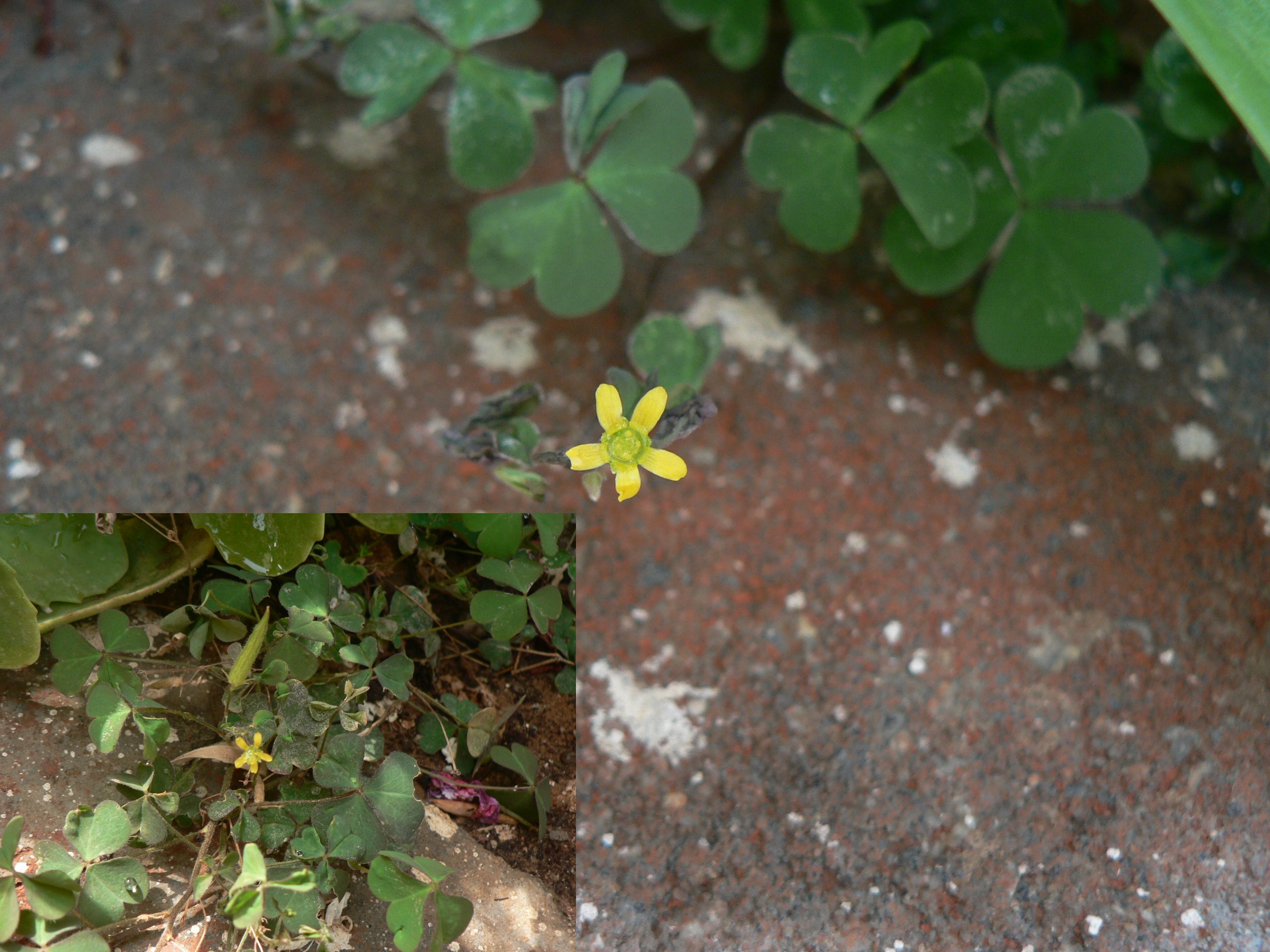 Oxalis corniculata חמציץ קטן